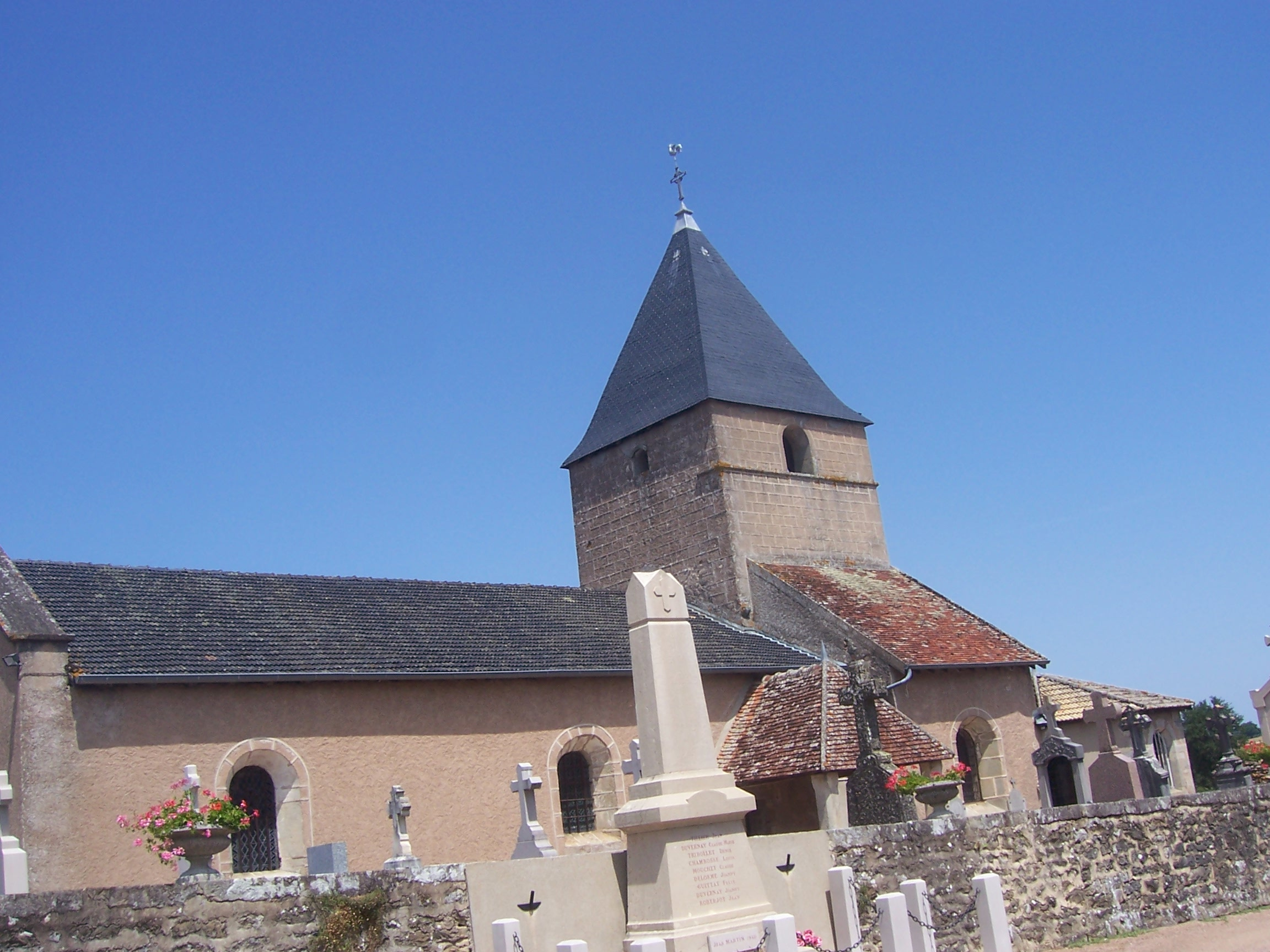 Furlan: Eglise de Ballore